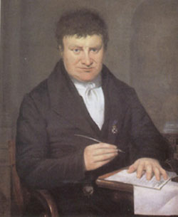 Portret van Theodorus van Swinderen